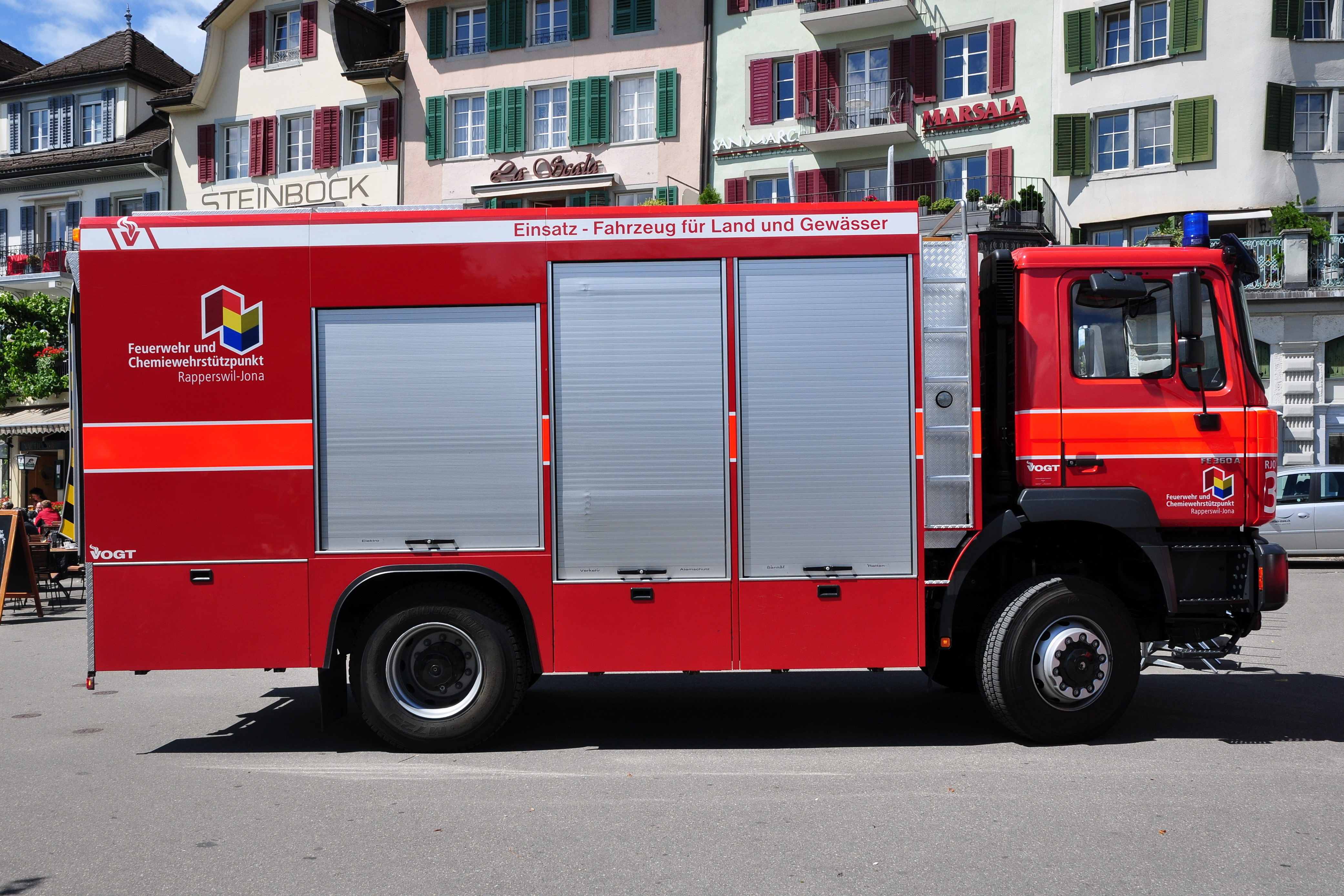 VOGT FE360A, Feuerwehr Rapperswil-Jona, Seestrasse in Rapperswil (Switzerland)